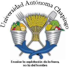 Logo de la Universidad Autónoma Chapingo, México